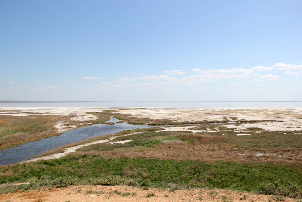 Эльтонский: Природный парк "Эльтонский" расположен на территории Эльтонского, Венгеловского и Приозерного сельских поселений Палласовского муниципального района.,Палласовский район, Волгоградская область This image is related to the protected area of Russia number 3410343